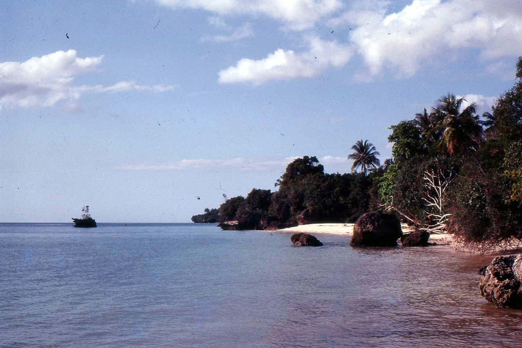 Mangapwani